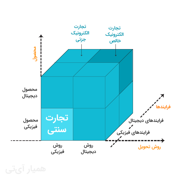 این شکل، ابعاد تجارت الکترونیک (محصول، روش پرداخت و فرایندها) را نمایش می‌دهد